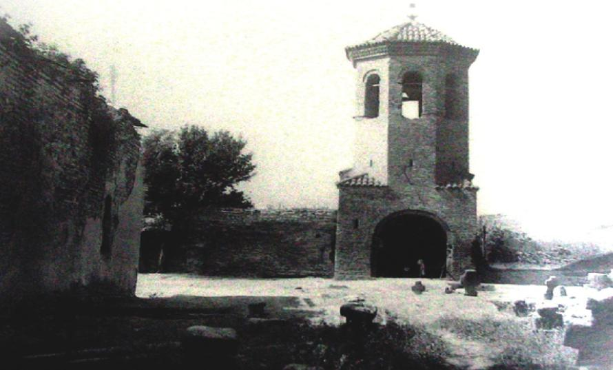 Turnul-clopotniță al schitului Codreni, dispărut în 1985 sub apele acumulării Mostiștea